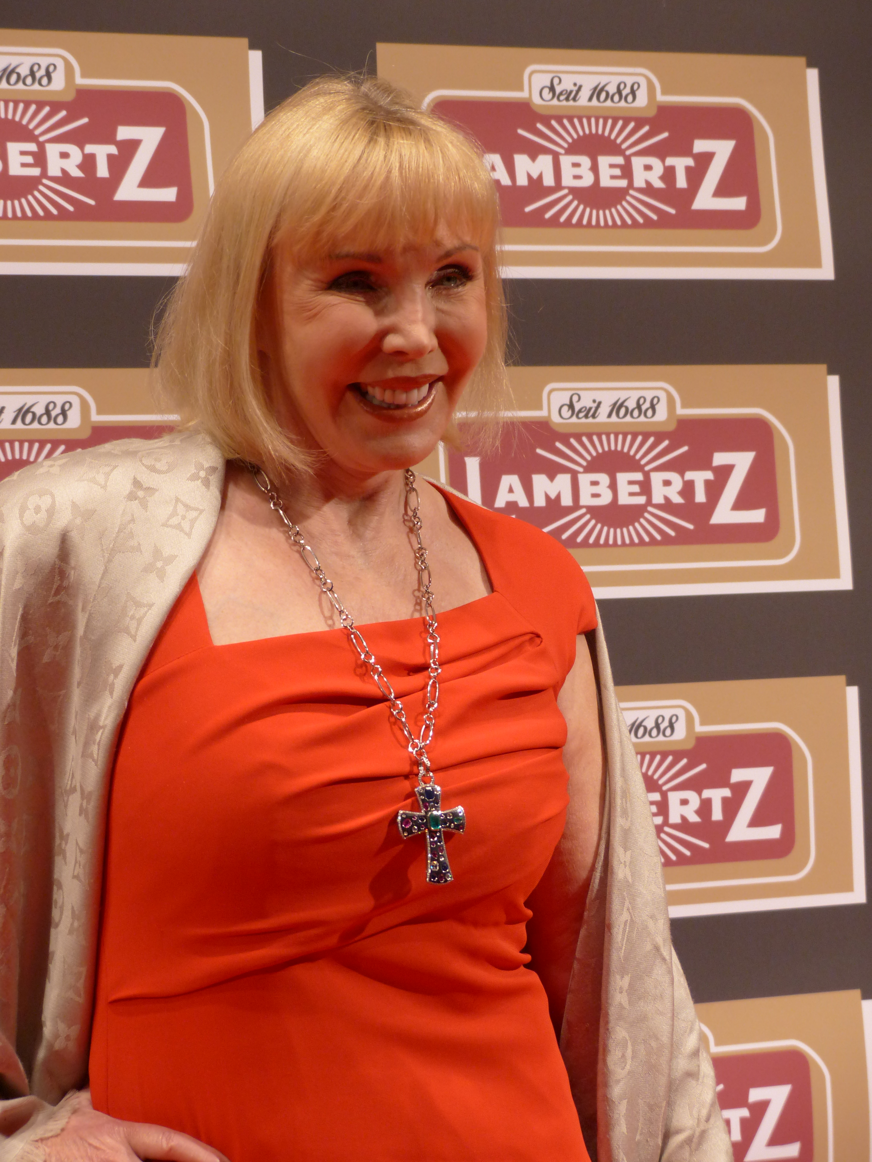 Heike Maurer bei der Lambertz Monday Night, im Februar 2016.